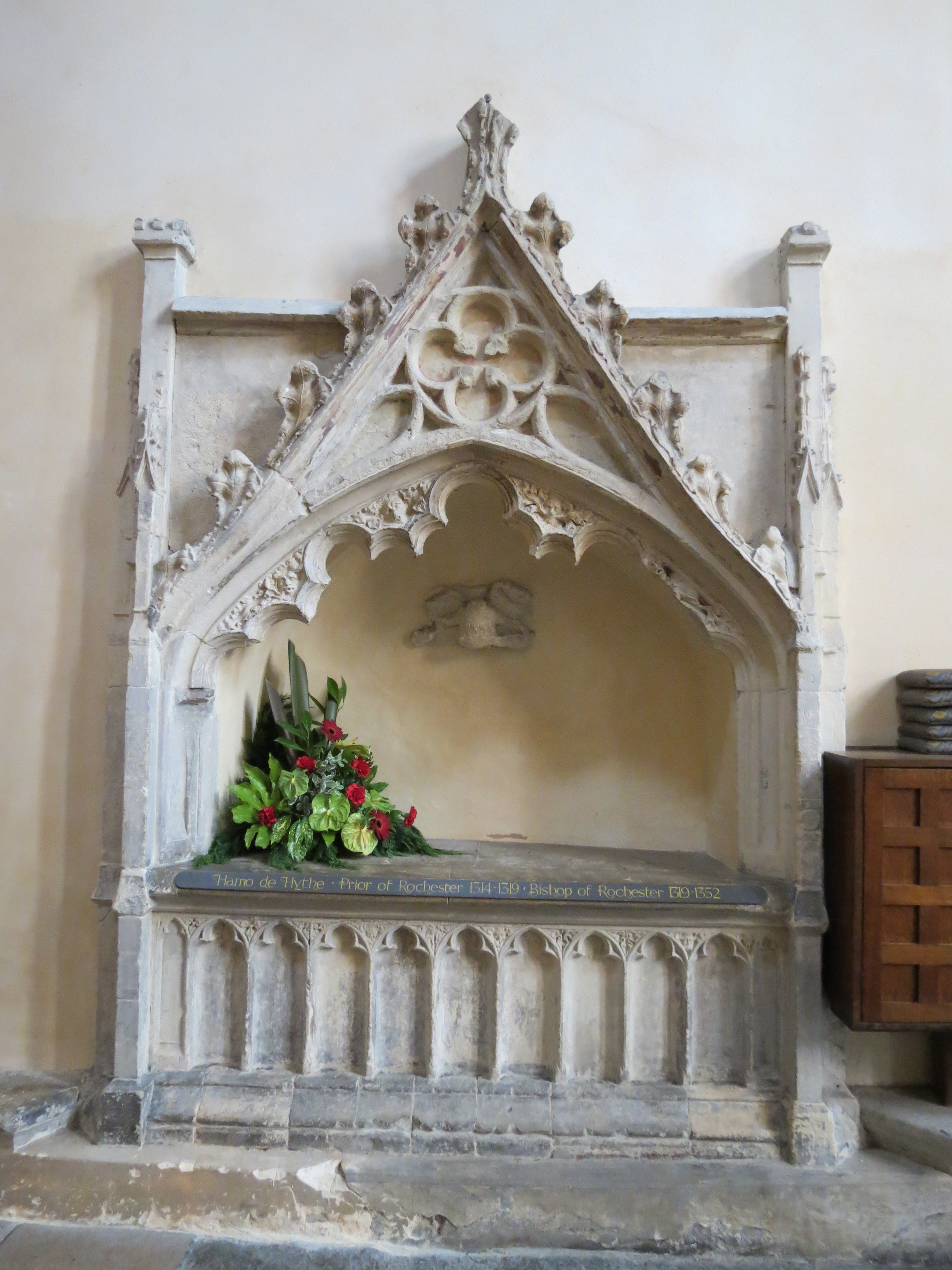 Enfeu de Hamo de Hythe, prieur (1314-1319) puis évêque de Rochester (1319-1352) dans la cathédrale de Rochester.